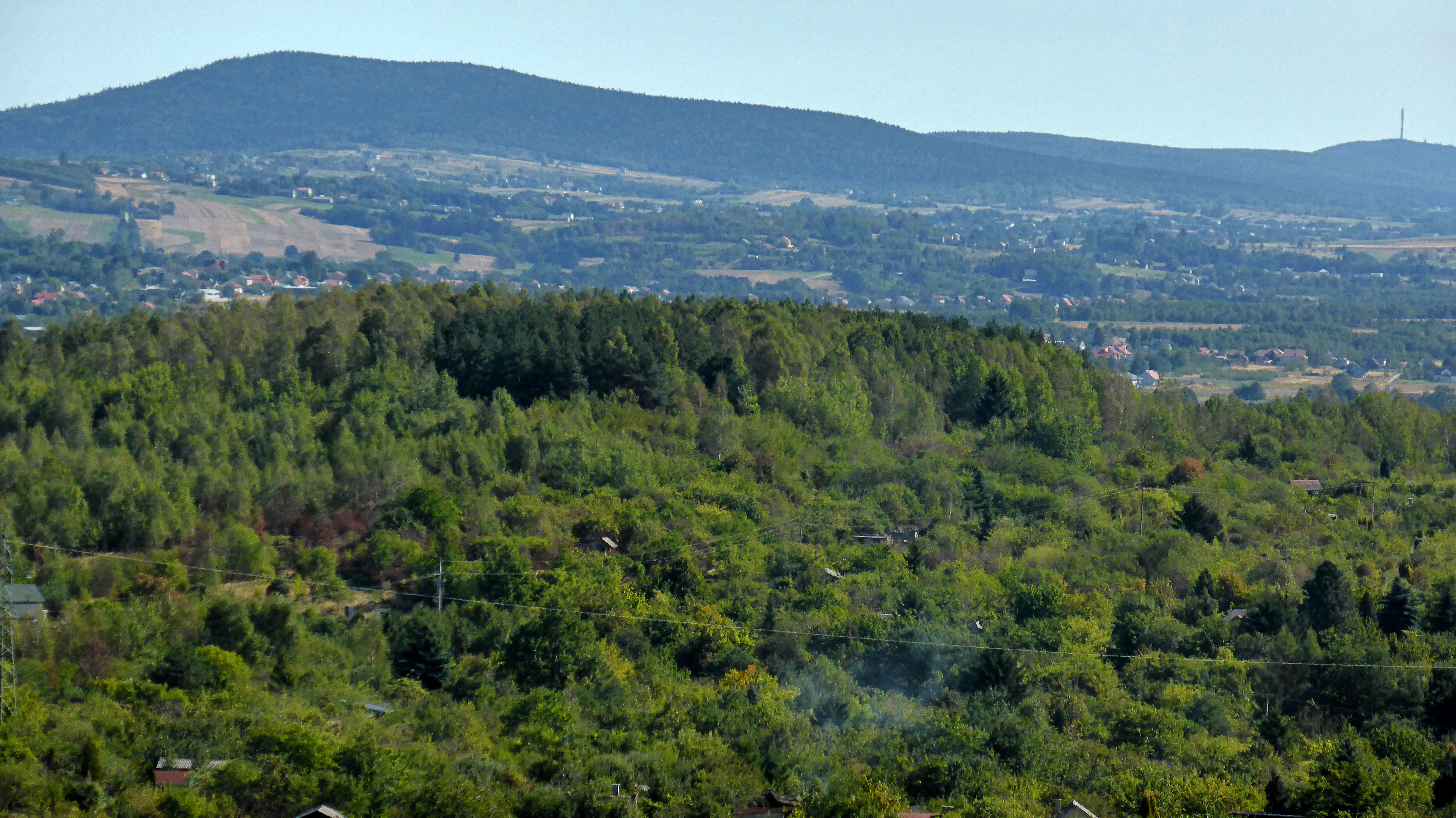 Zalesiony wierzchołek Świniej Góry(346m.n.p.m) na tle Pasma Łysogórskiego Gór Świętokrzyskich